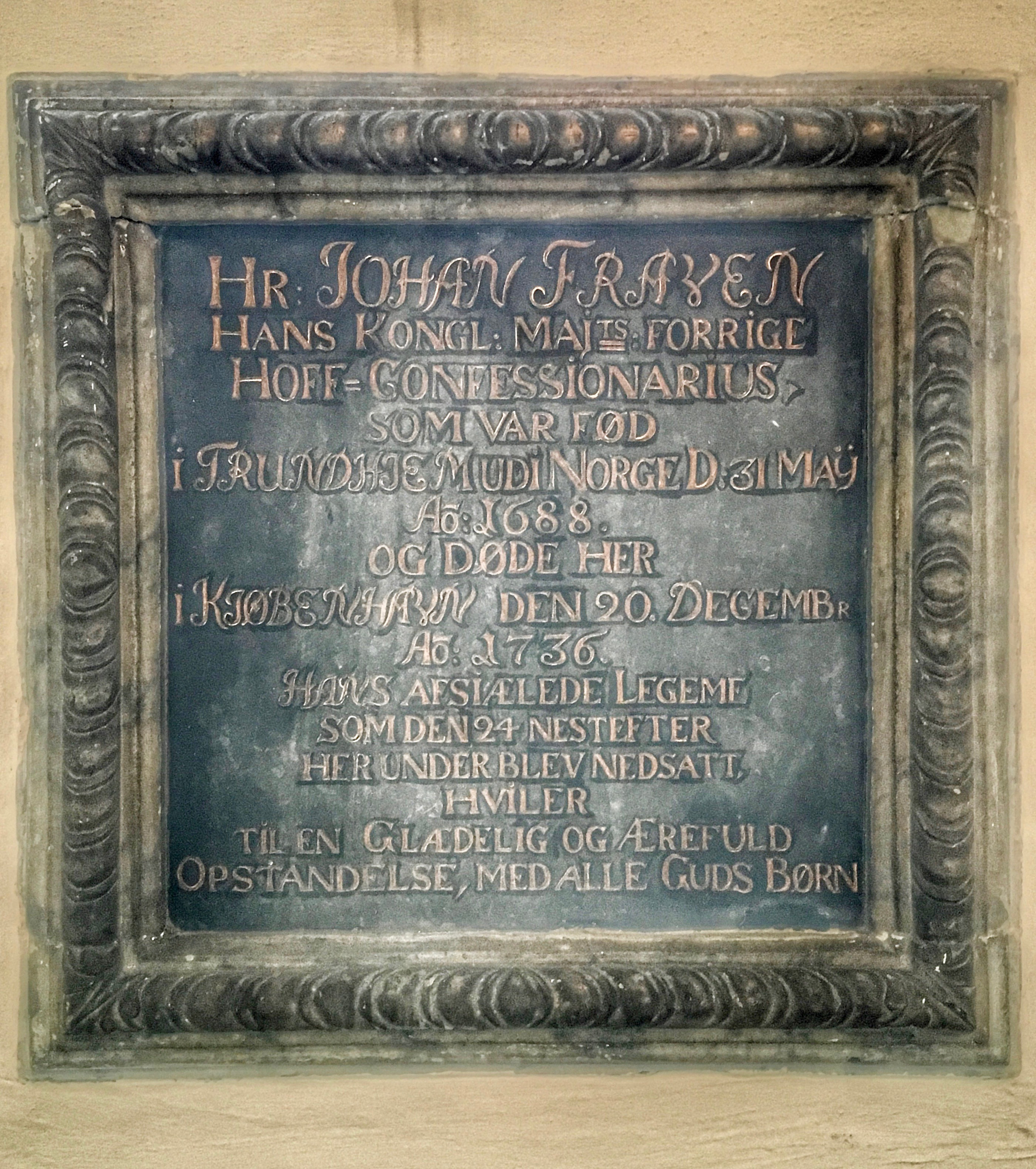 Gravminde over hoff-confessionarius Johan Frauen (1688-1736) i Kapelsalen, Holmens Kirke, København